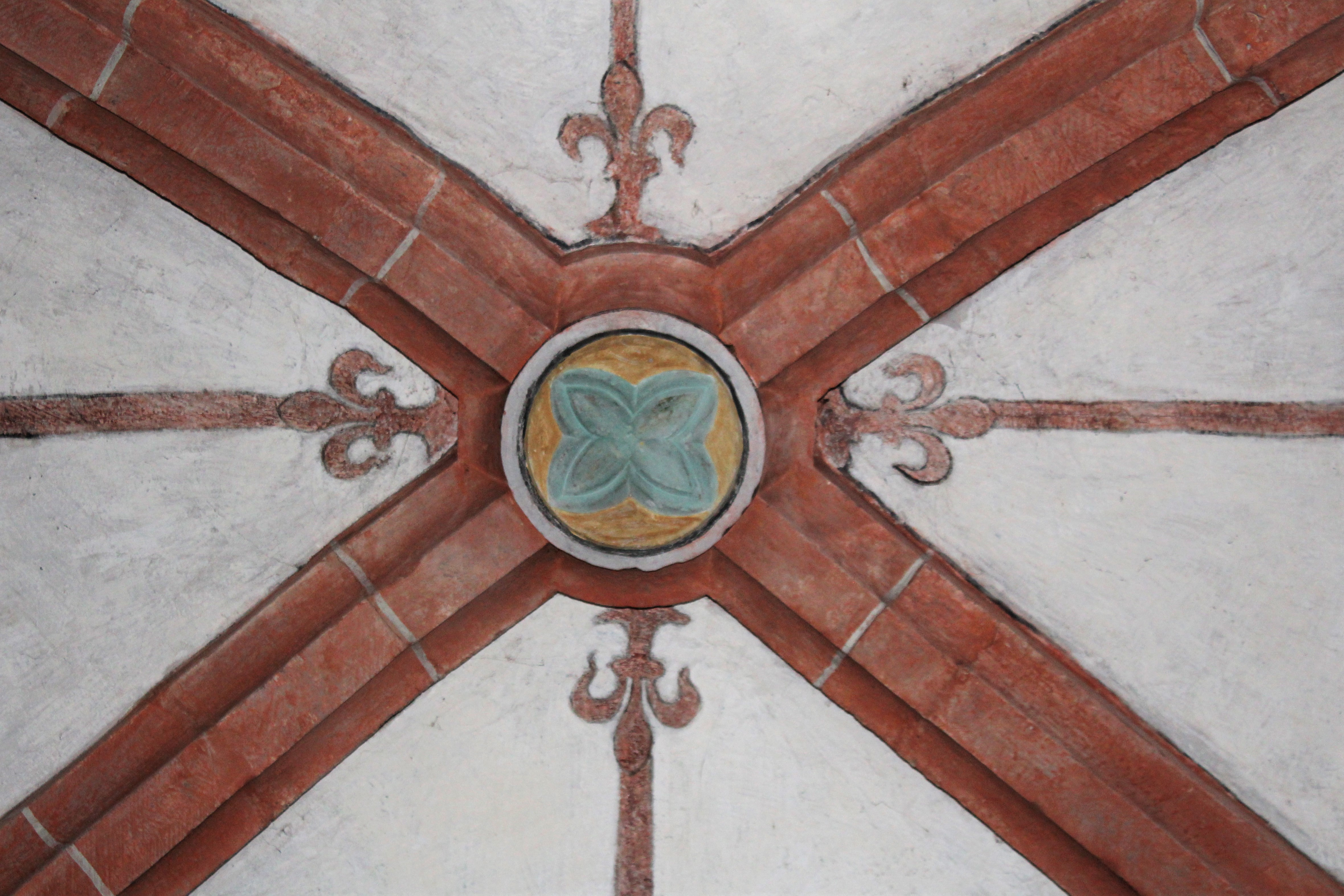 Evangelische Kirche Sterzhausen, Lahntal, Landkreis Marburg-Biedenkopf, Hessen, Deutschland